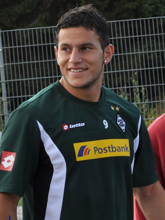 Raul Bobadilla beim Training